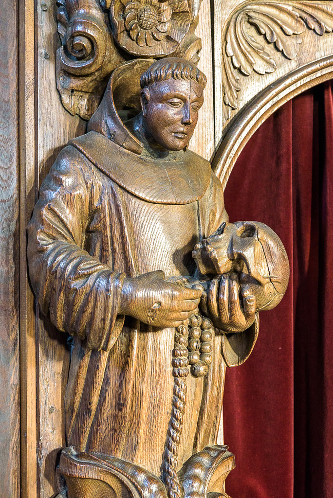 Afbeelding van biechtstoelheilige Franciscus van Assisi in de Sint Jan Waalwijk